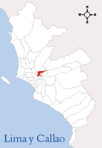 Ubicación del Distrito de El Agustino Esta imagen ha sido elaborada por --Edgardo Reyes 17:31 9 mar, 2005 (CET) Categoría:Mapas del Perú (imagen)